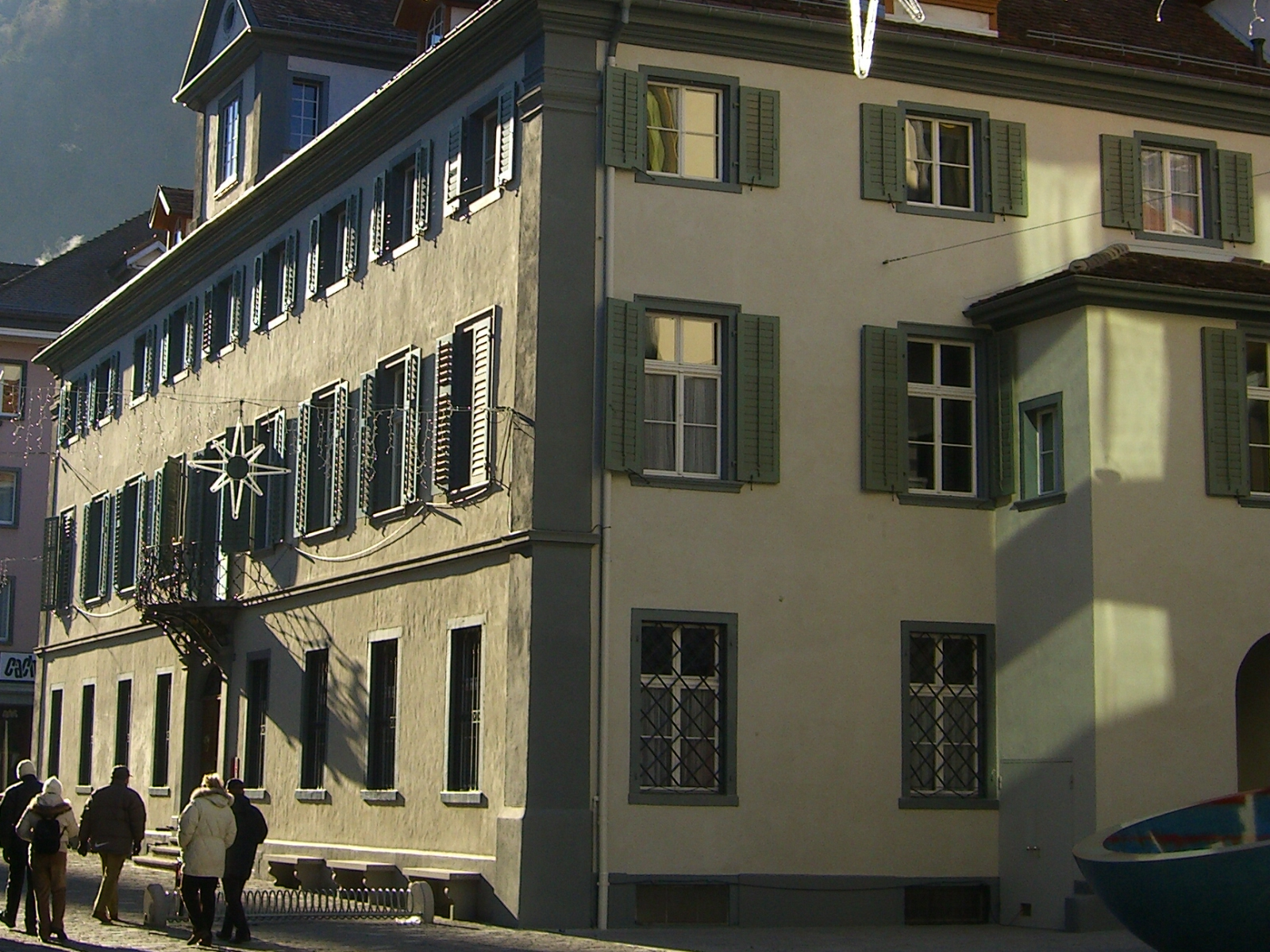 Kantonsgerichtsgebäude in Chur/Schweiz. Quelle: Bravuogn; Autor: Bravuogn